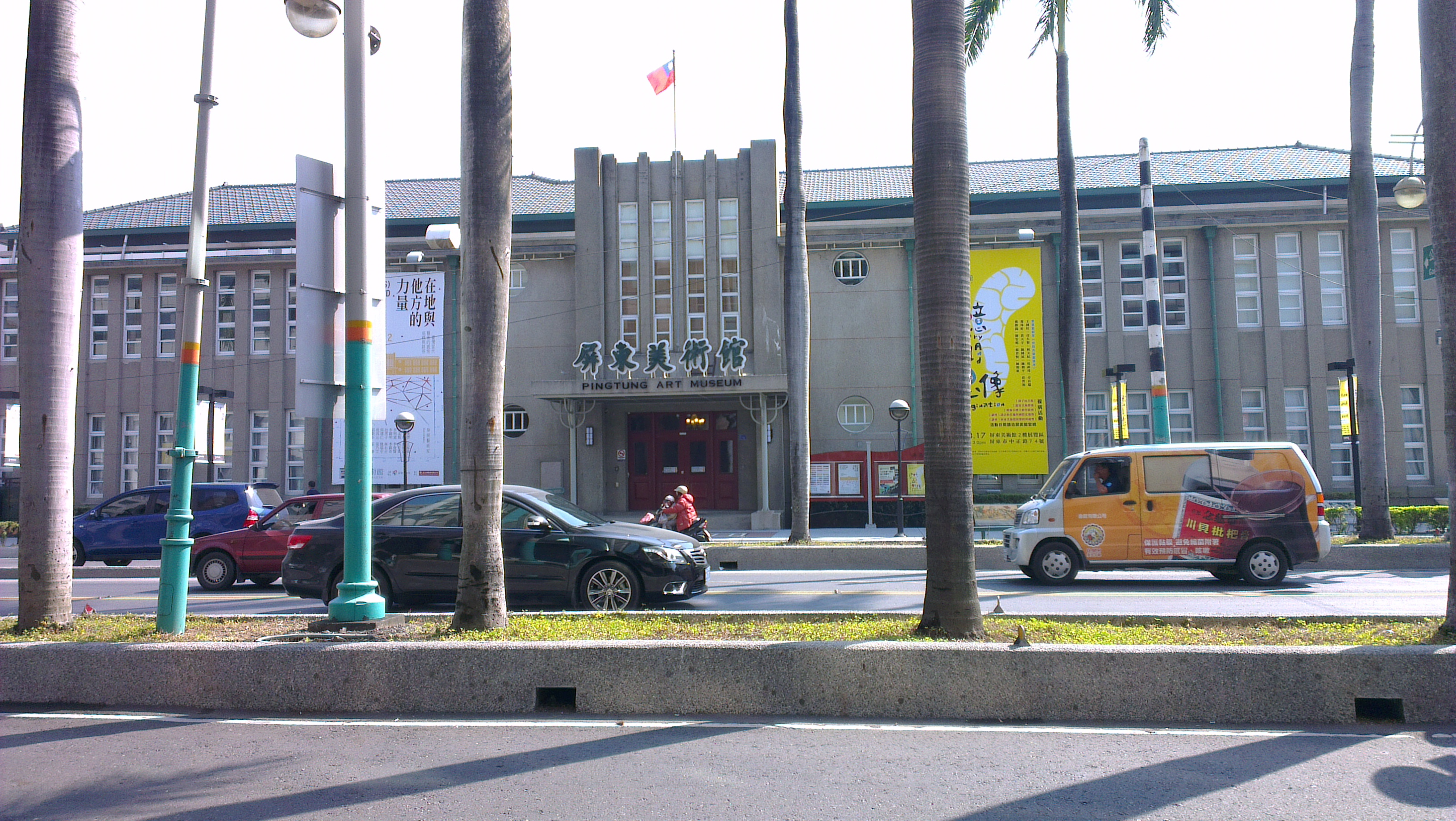 中文（台灣）: 屏東市立美術館正面外觀。